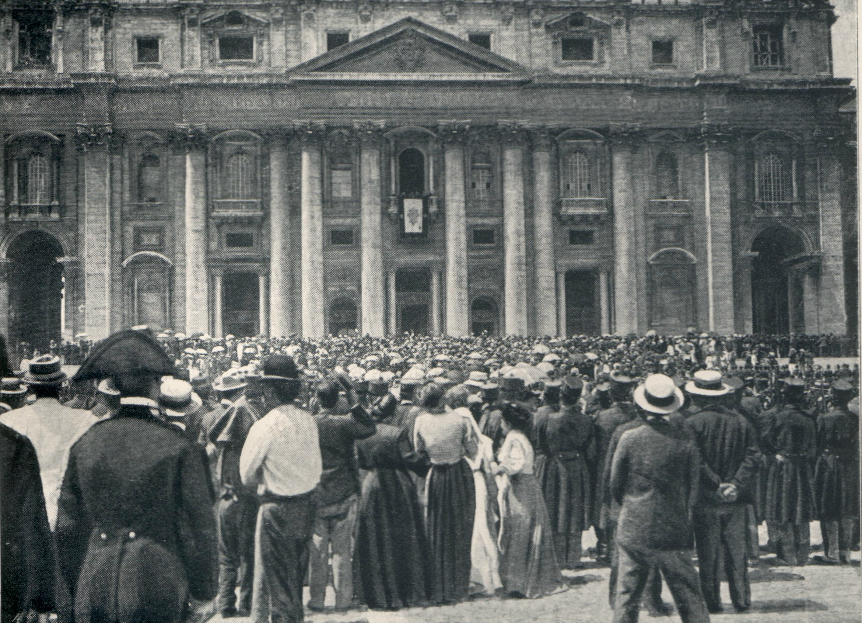 Habemus papam (Luigi Macchi - Pius X)